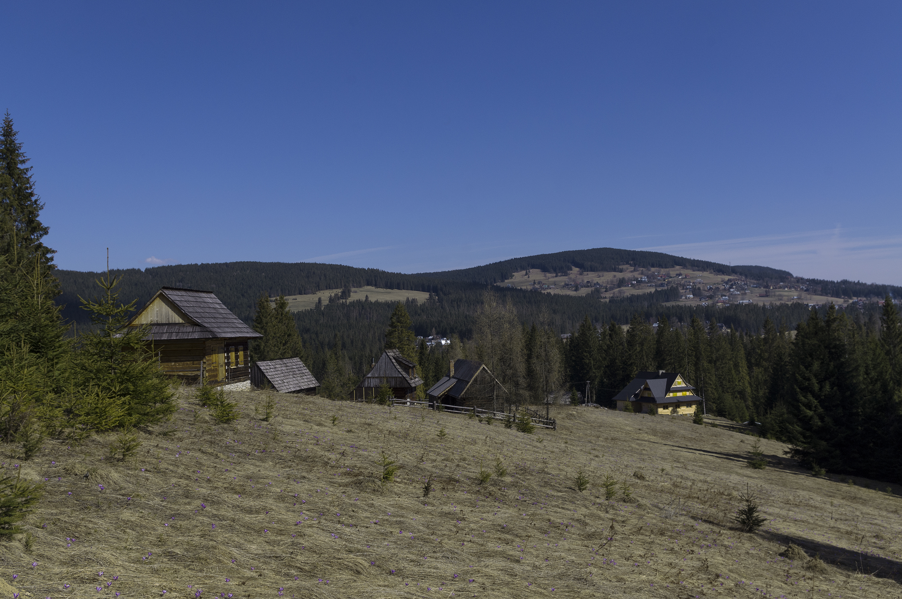 Polna Hawryłówka